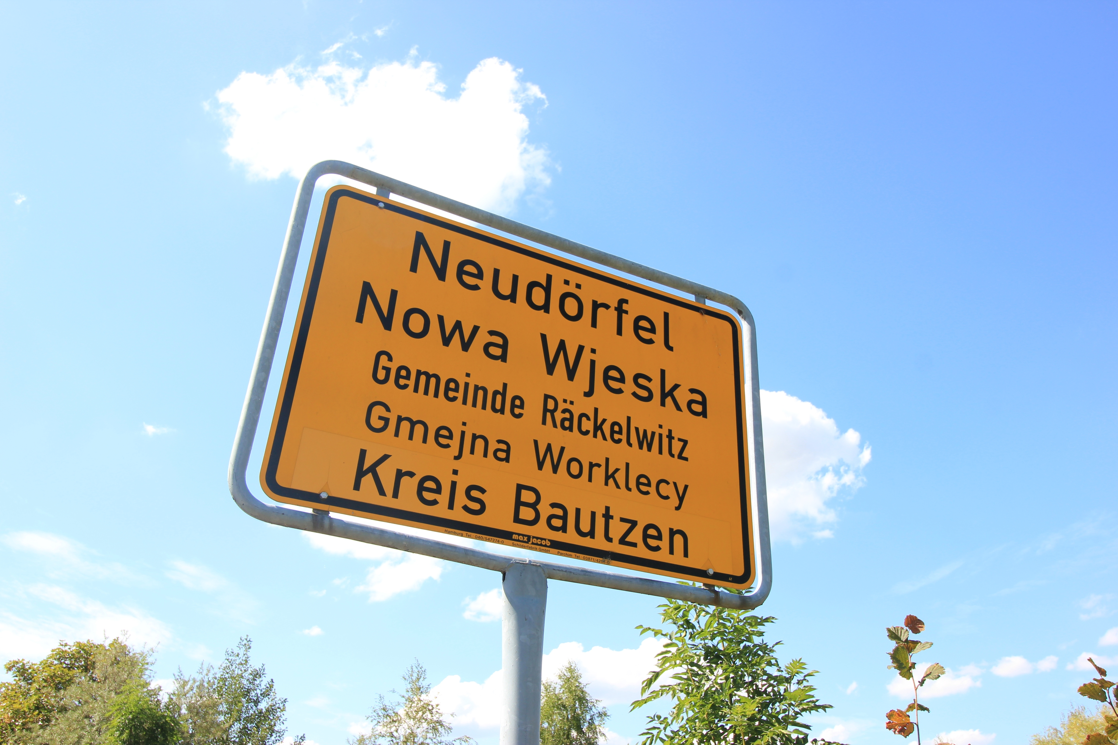 Hornjoserbsce: Wjesna tafla Noweje Wjeski.